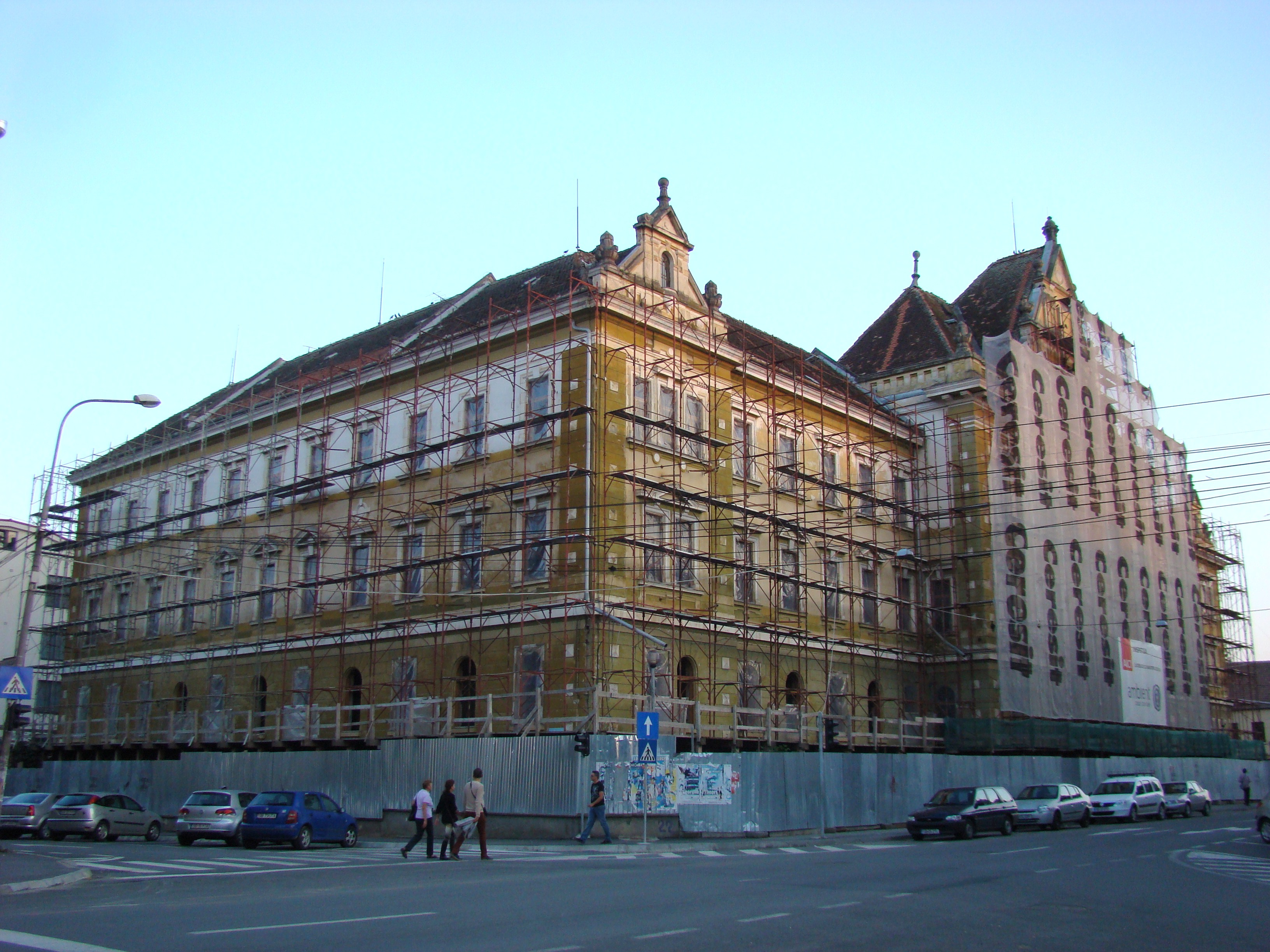 Tribunalul Sibiu